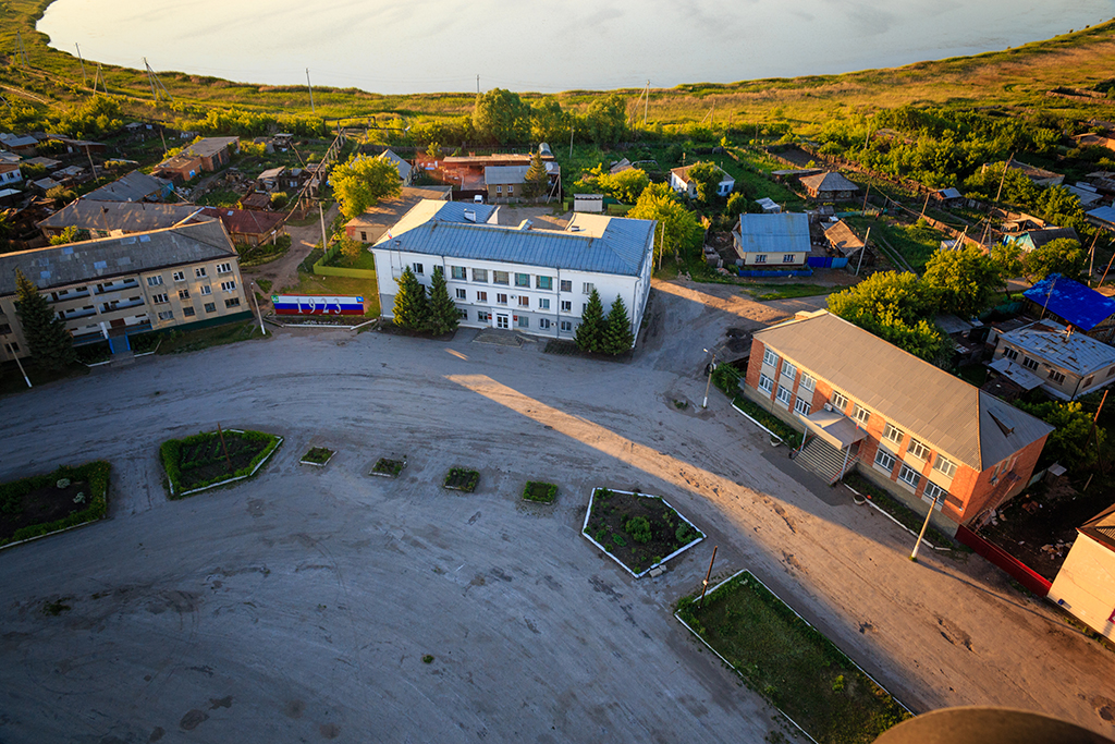 Центральная площадь пгт. Мишкино с высоты птичьего полета